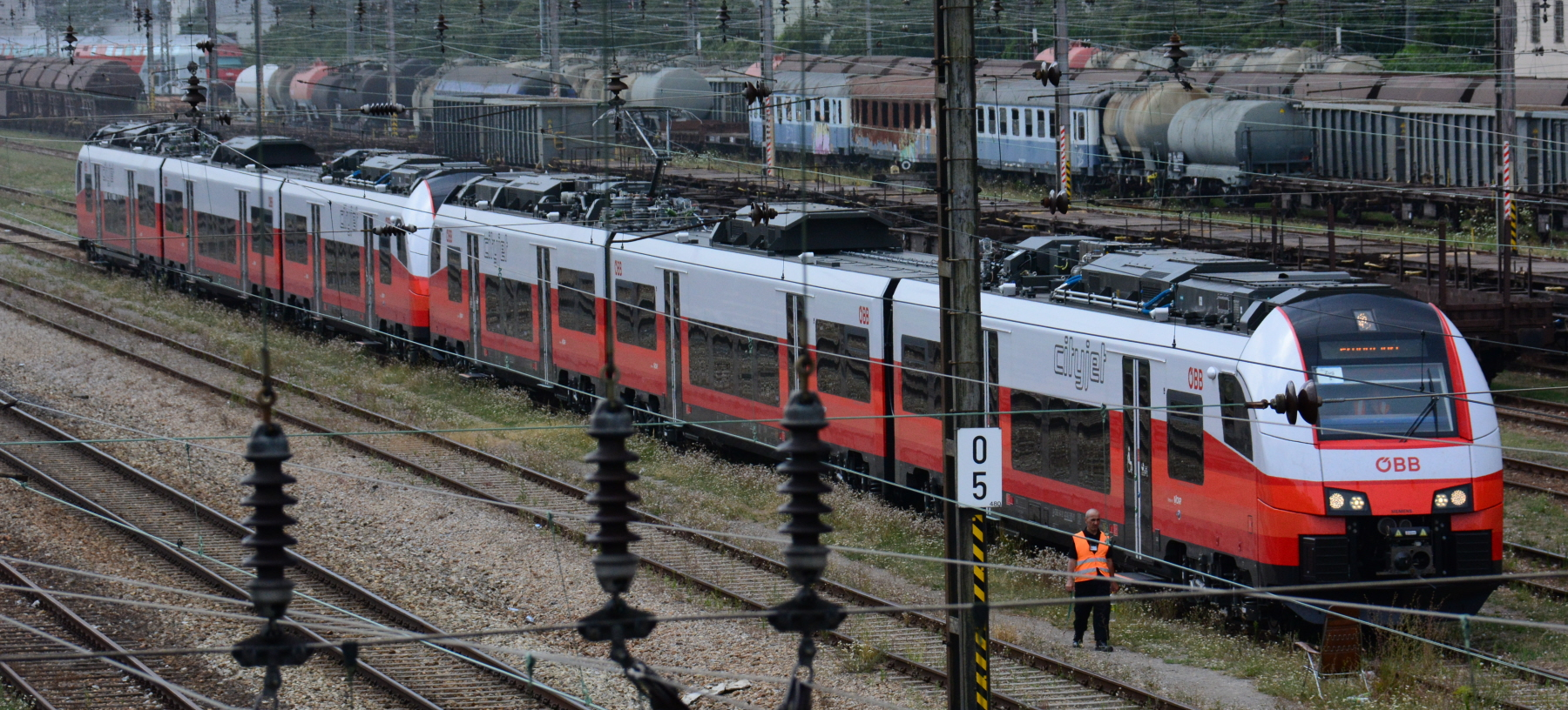 Zwei Garnituren des ÖBB cityjet im Probebetrieb auf dem Frachtenbahnhof Penzing in Wien